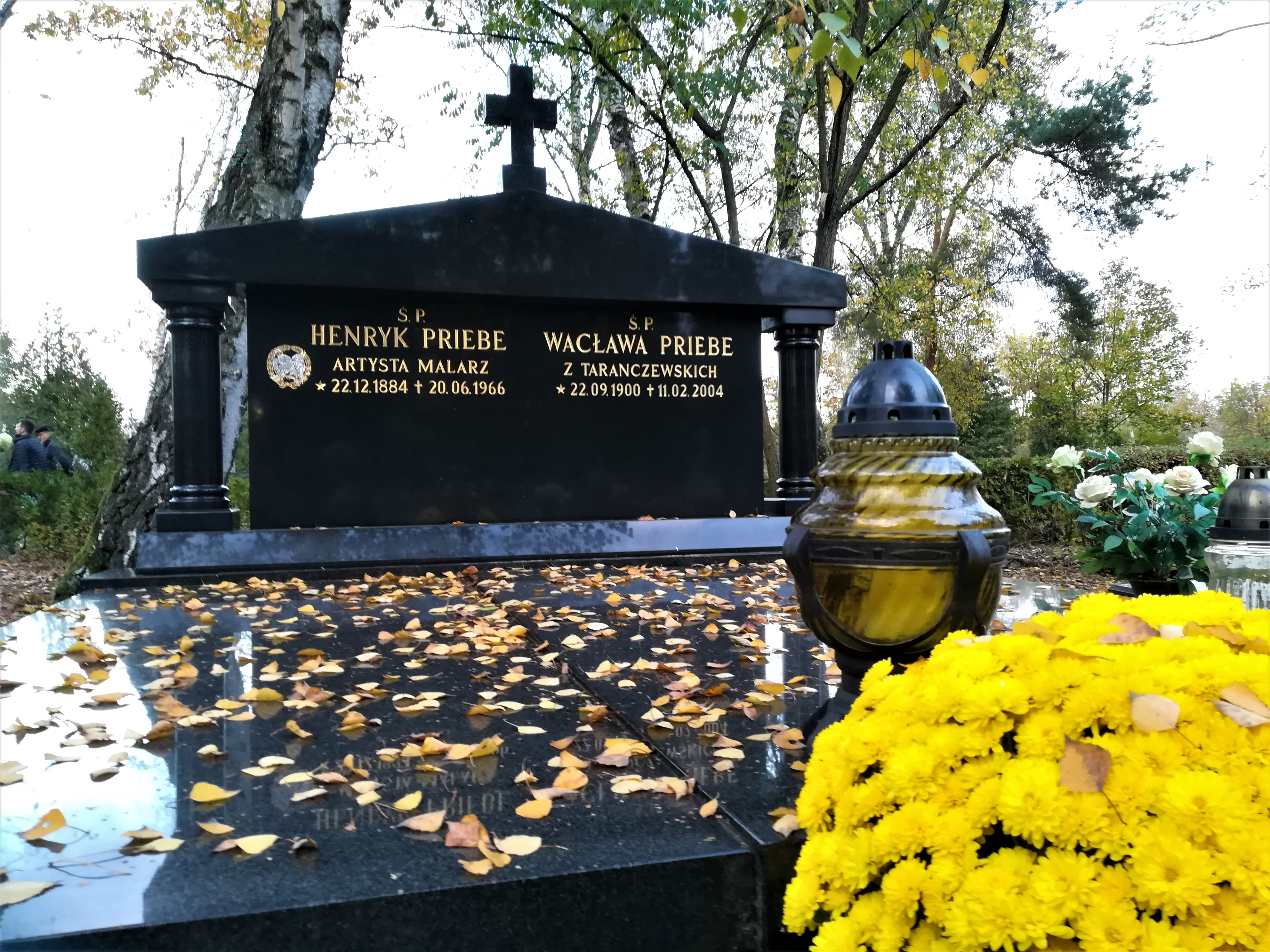 Grób malarza i powstańca wielkopolskiego - Henryka Priebe na cm. junikowskim w Poznaniu.